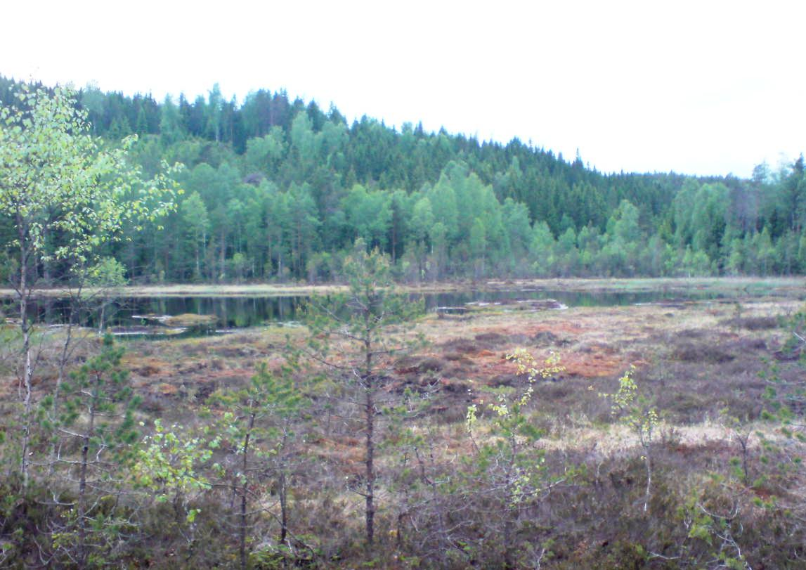 Elgtjern på Lierfoss i Aurskog-Høland kommune.